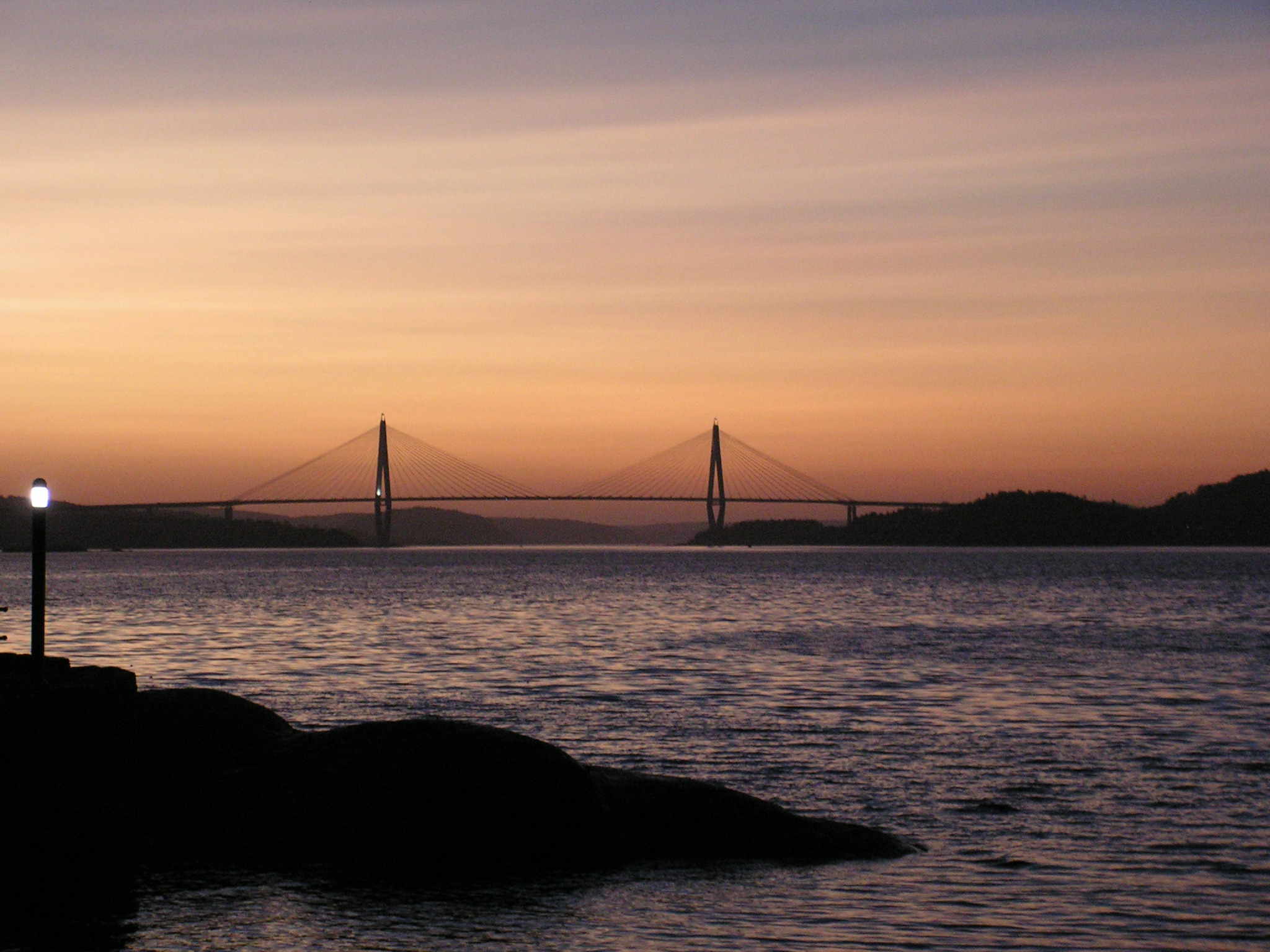 Uddevallabron, fotograferad 2006-12-27 av Tubaist